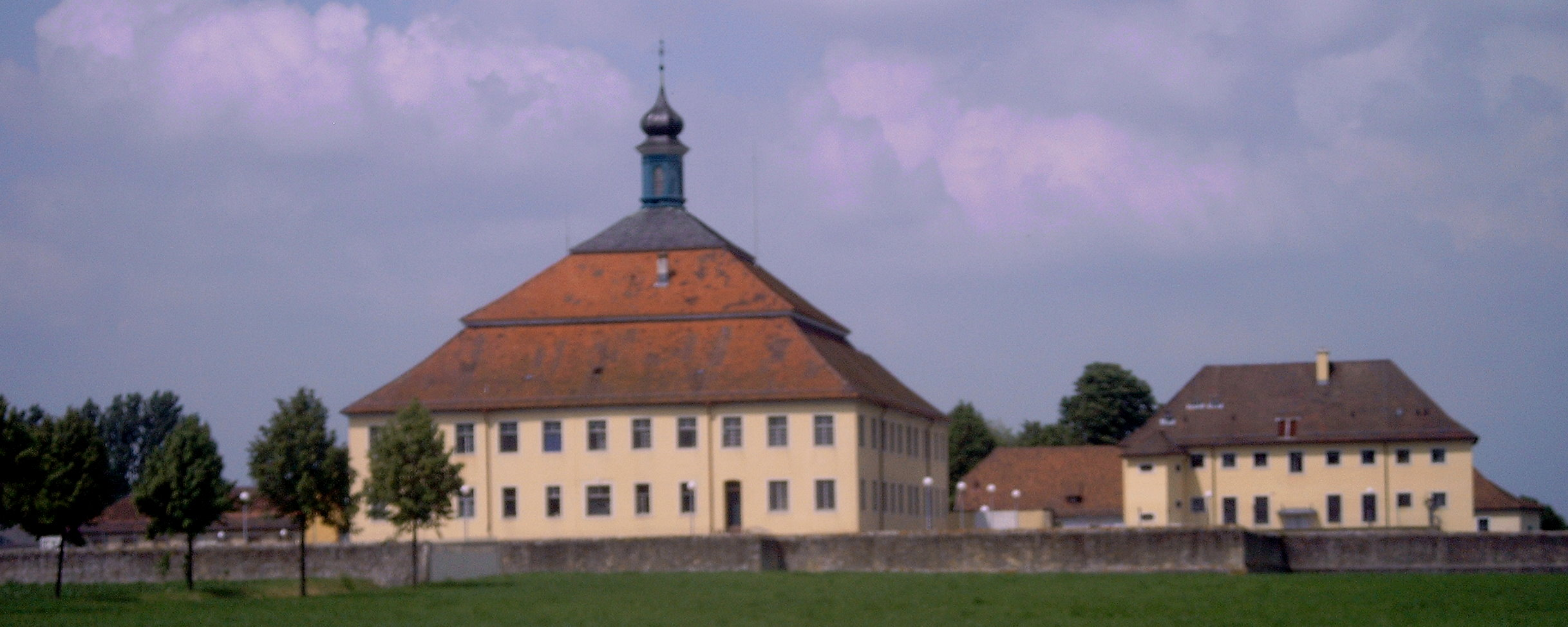 Schloß Kislau